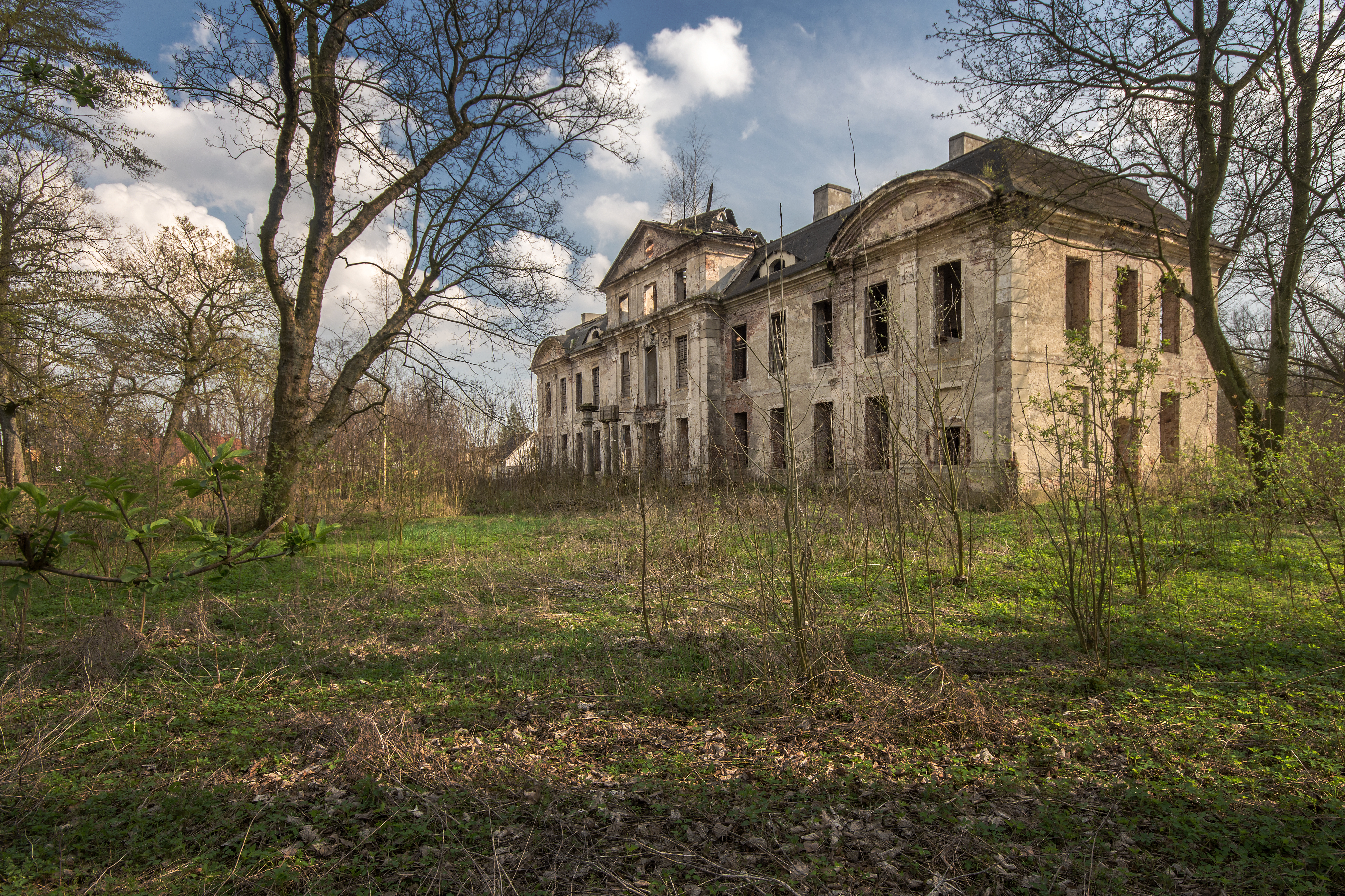 Brzezinka, pałac, 1725, XIX